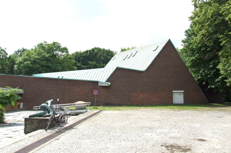 Berlin-Hansaviertel,Akademie der Künste-Studio, Entwurf Werner Düttmann